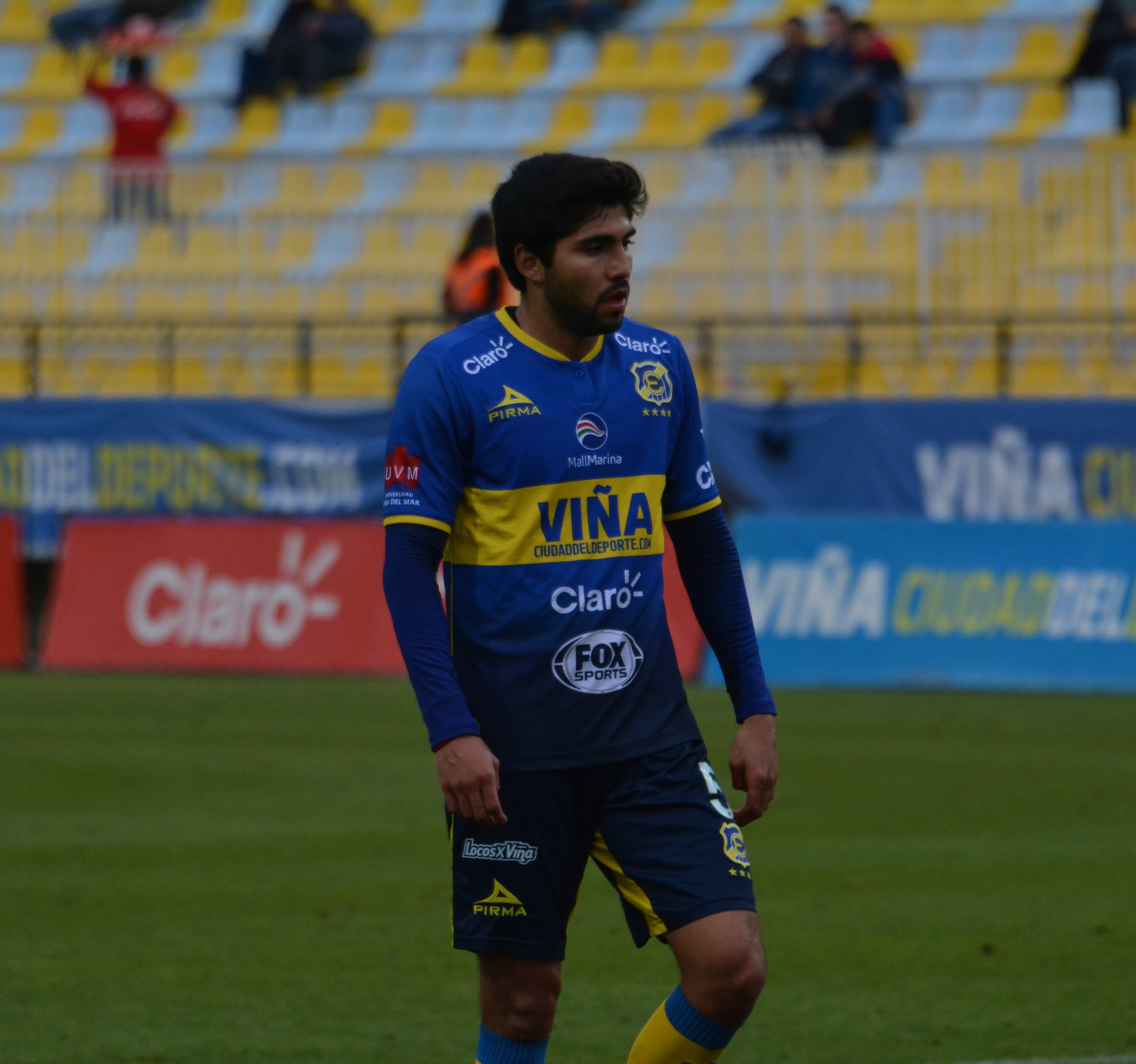 Everton v Unión Española, Estadio Sausalito, Viña del Mar, Chile.